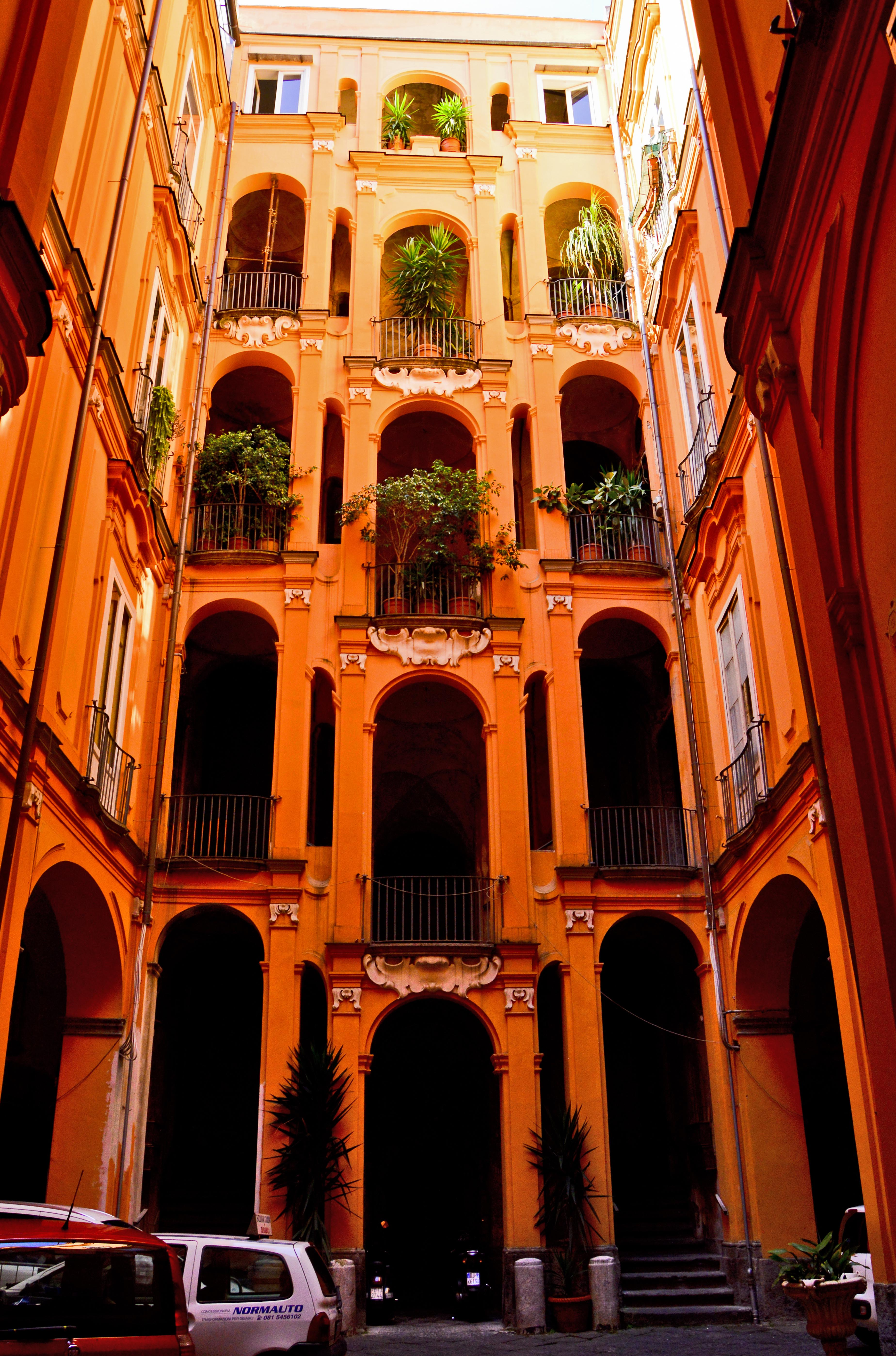 Scala a doppio pozzo su pilastri, detta "ad ali di falco"